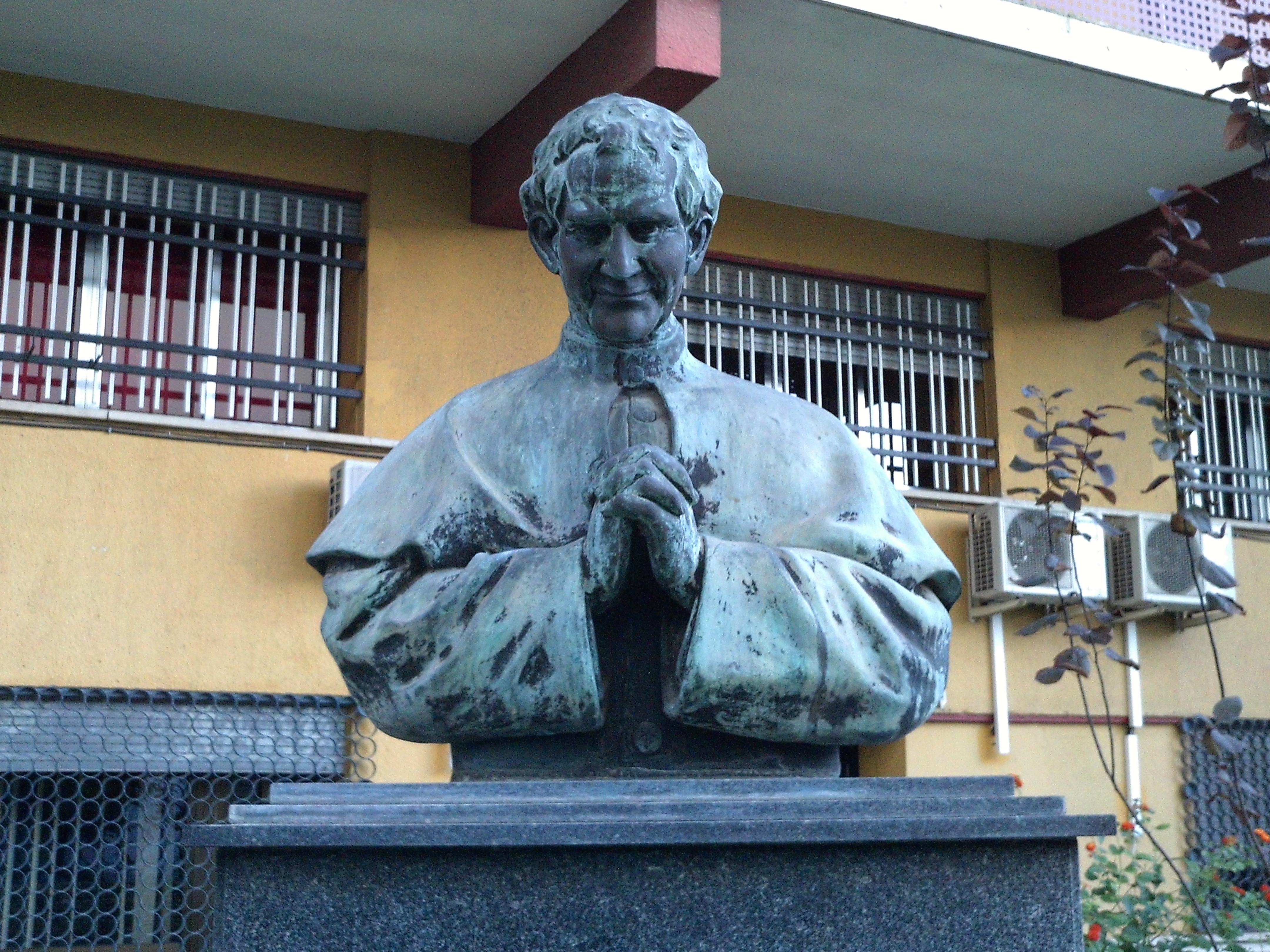 Don Bosco. 1988. Salesianos de la Trinidad. Sevilla. Andalucía, España.